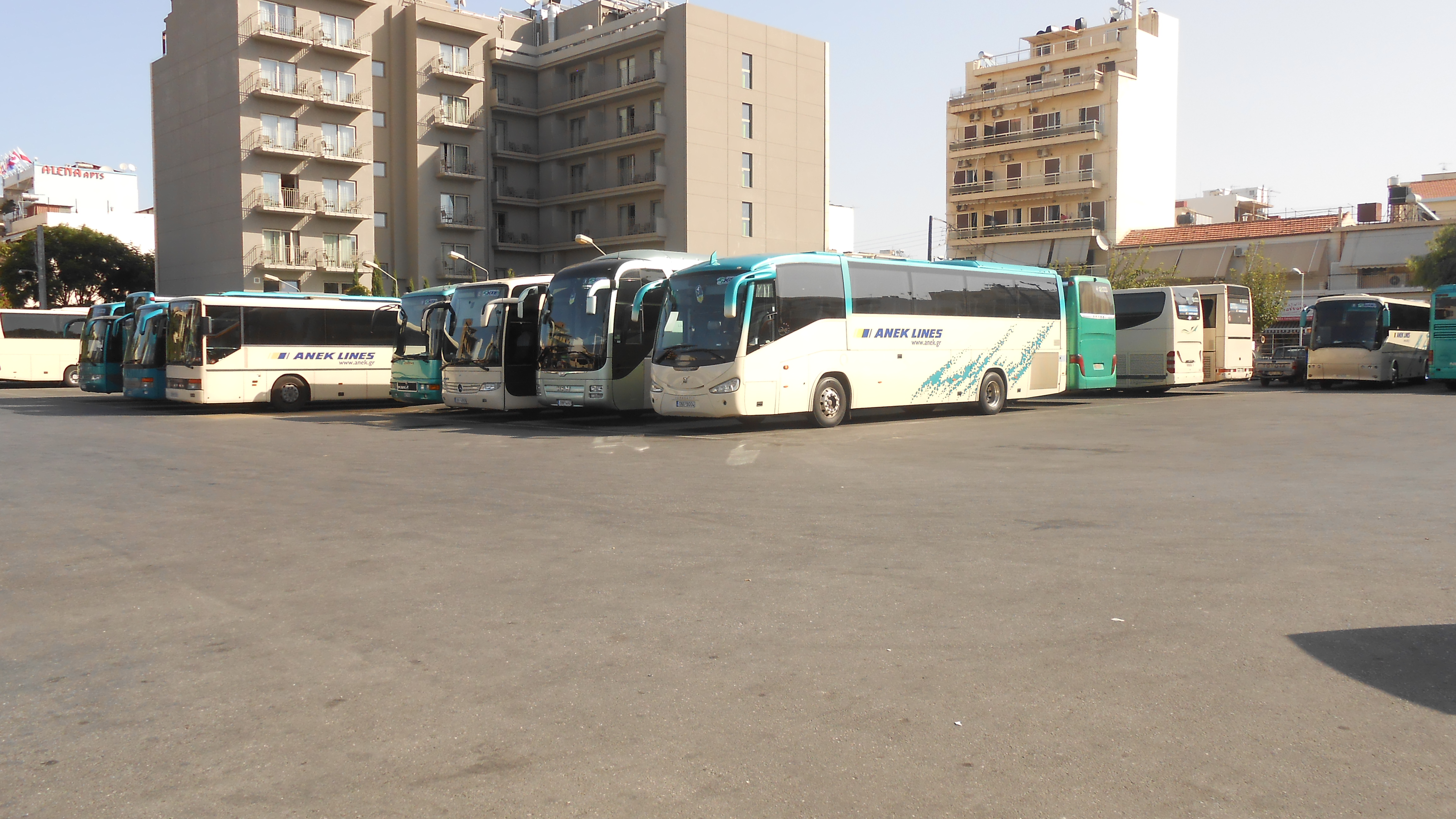 Im zentralen Busbahnhof von Chania.